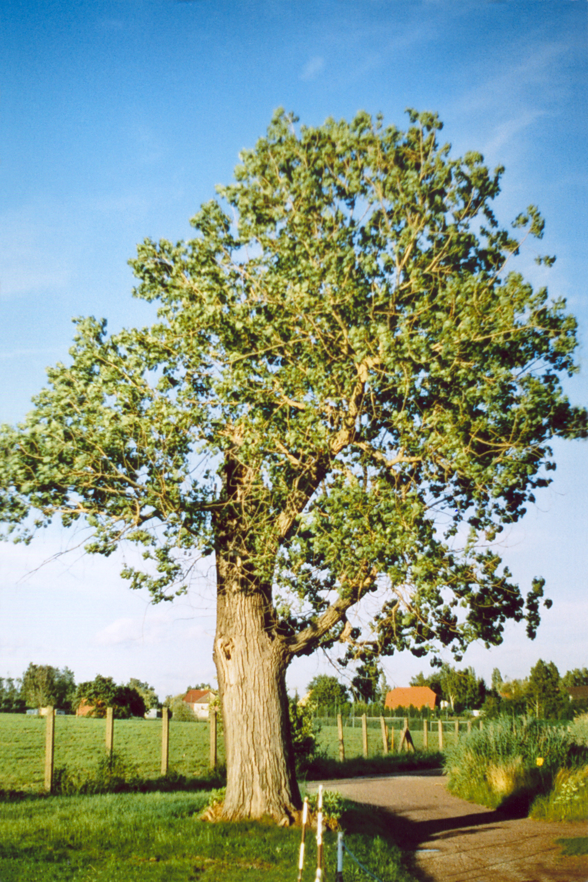 Populus, Hybrid Poplar